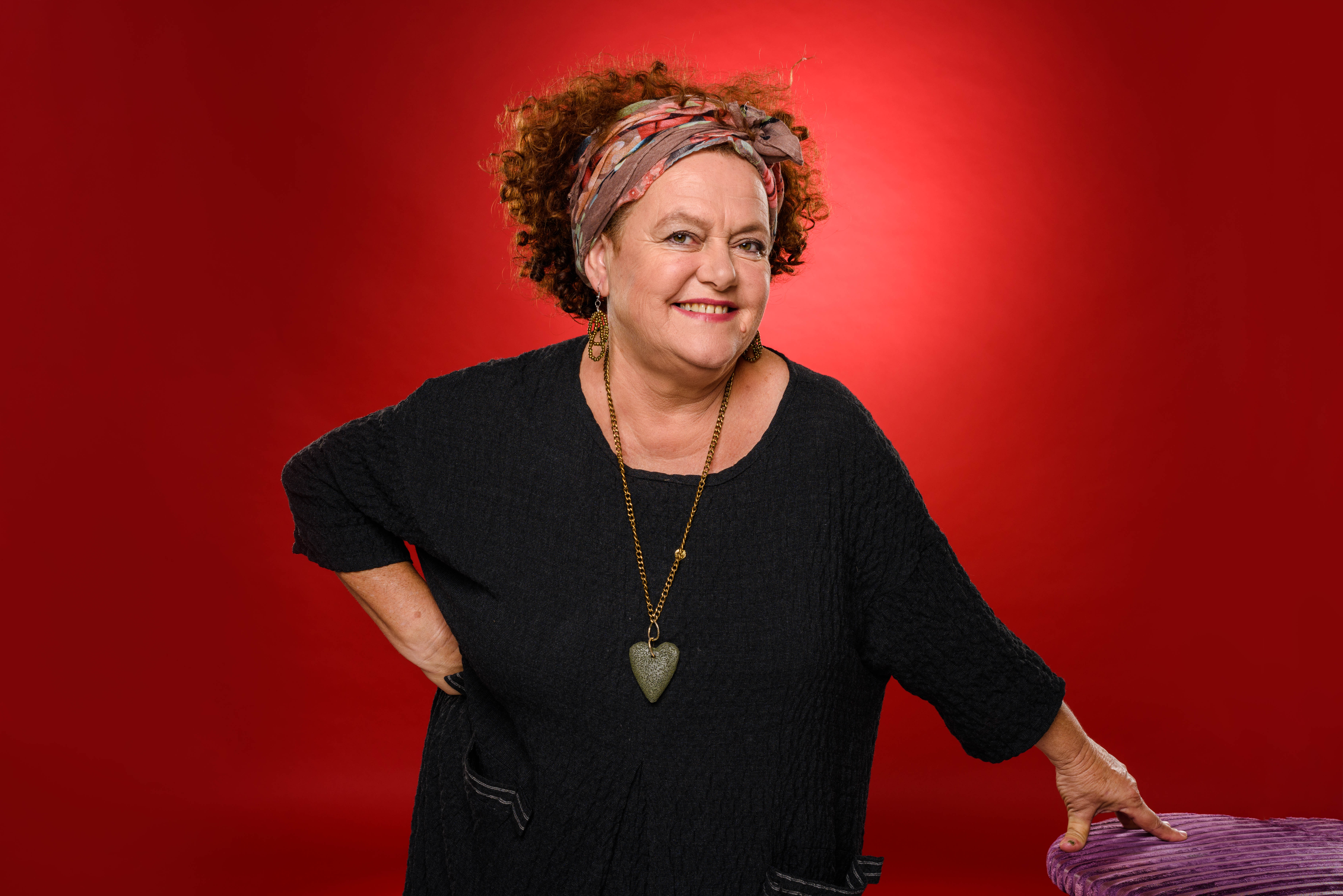 לאה שבת. צילום: משה נחומוביץ